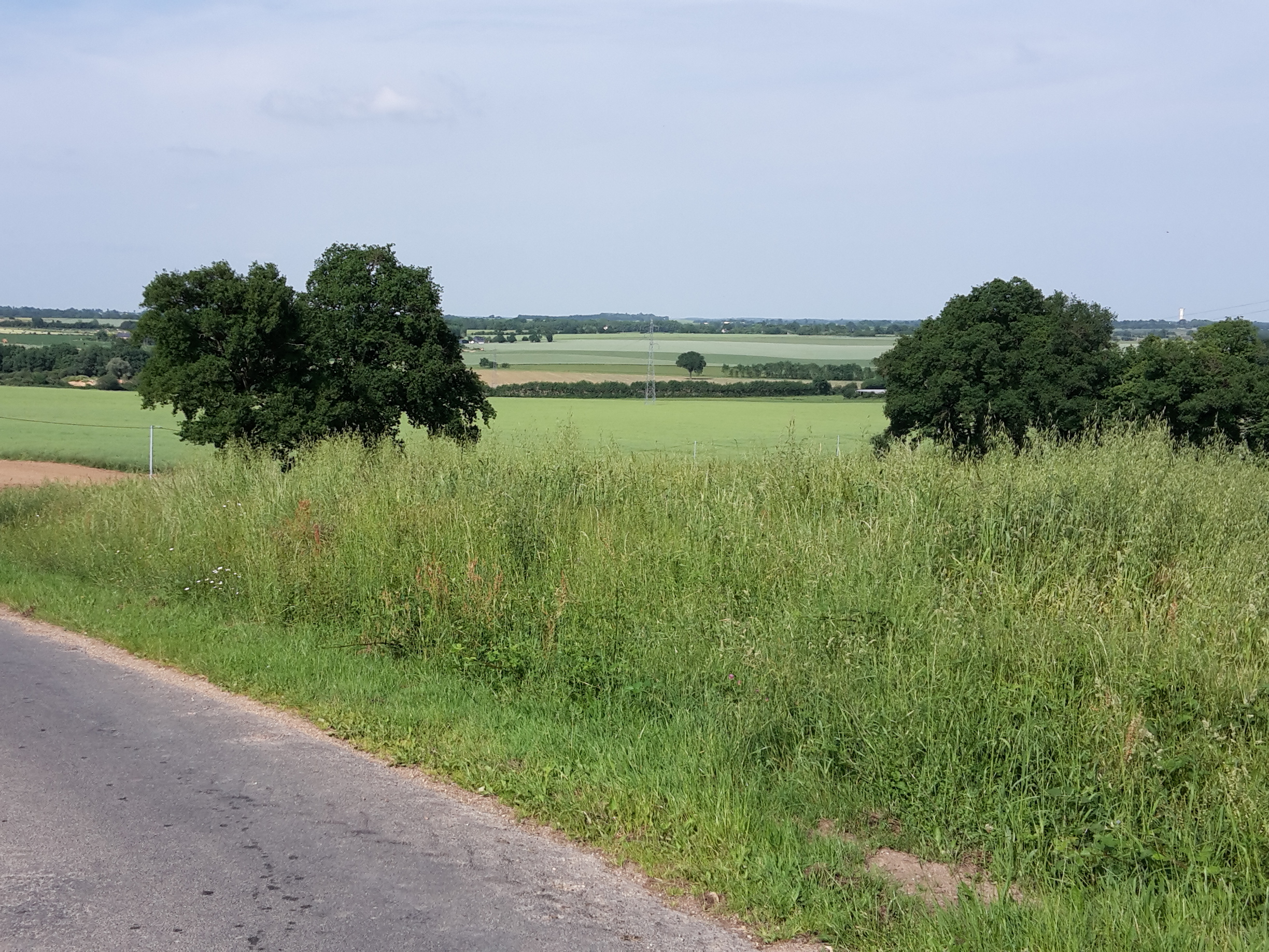 Vue du territoire la commune de Loiré, Maine-et-Loire, France.